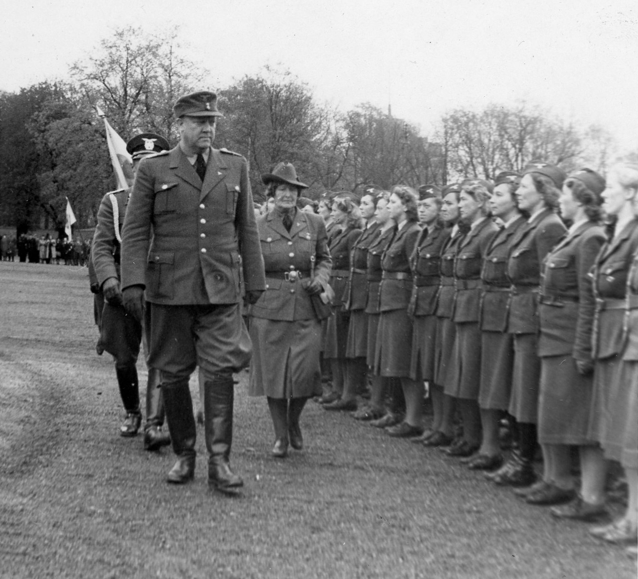 1944 Aftenposten 17. mai 1944: «Ministerpresidenten hylder Kvinnehirden. Talen under appellen på Slottsplassen i går. [...] kledelige grønne uniformer [...]»( Nasjonal samlings kvinneorganisasjons tiårsjubileum) RA/RAFA-3309/U 42/2 /42-2-6 img380